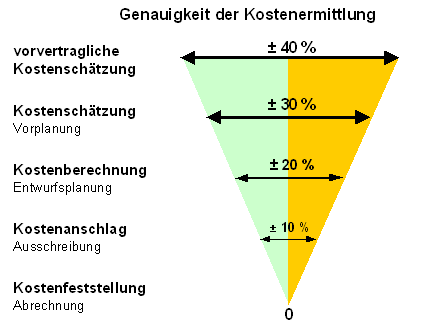 Genauigkeit von Kostenermittlungen im Bauwesen mit fortschreitender Planungstiefe (Grundlage: Kochendörfer et al. "Bau-Management-Systeme", Vieweg&Teubner Verlag 2010)